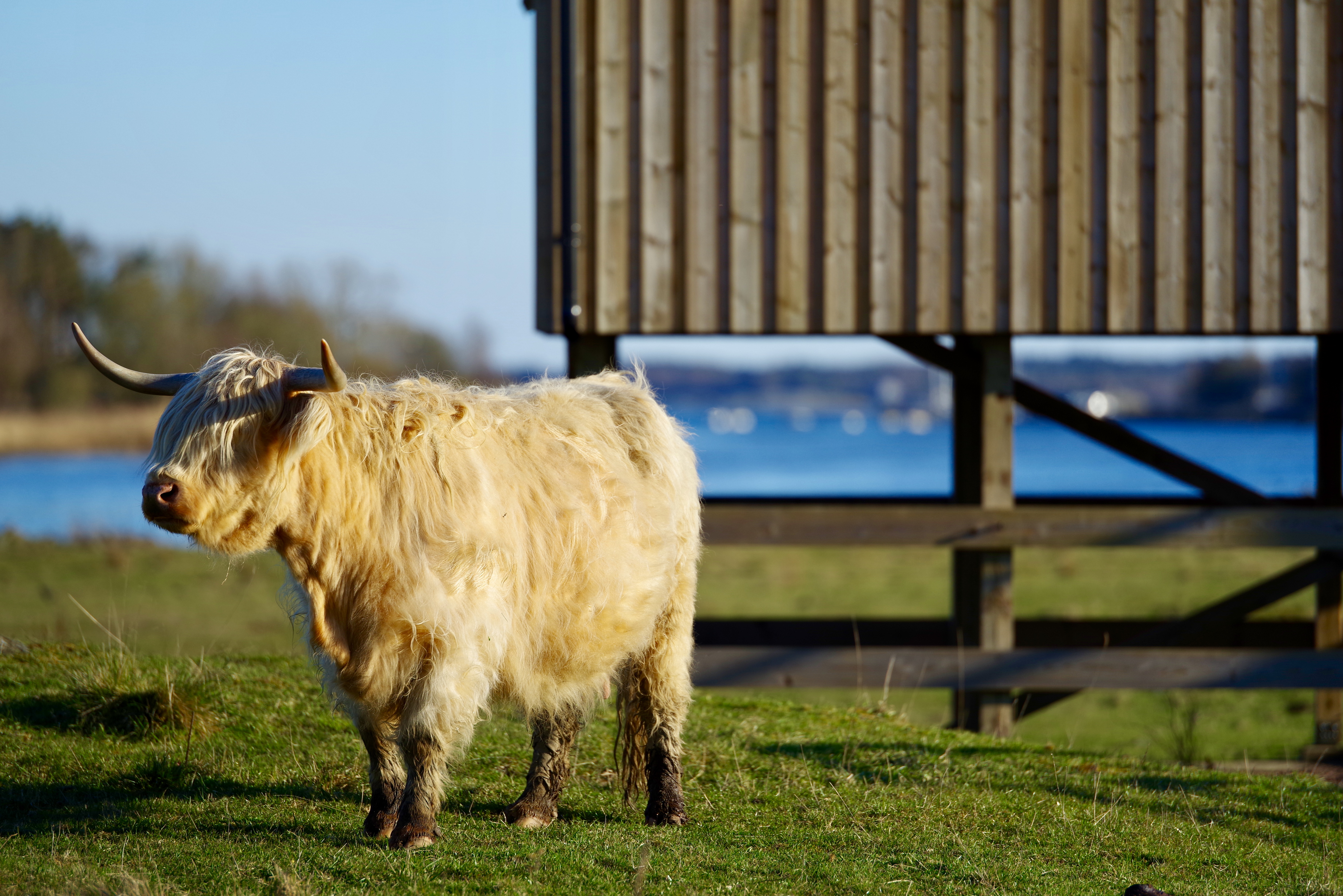 Highland cattle i Välens naturreservat utanför Göteborg.